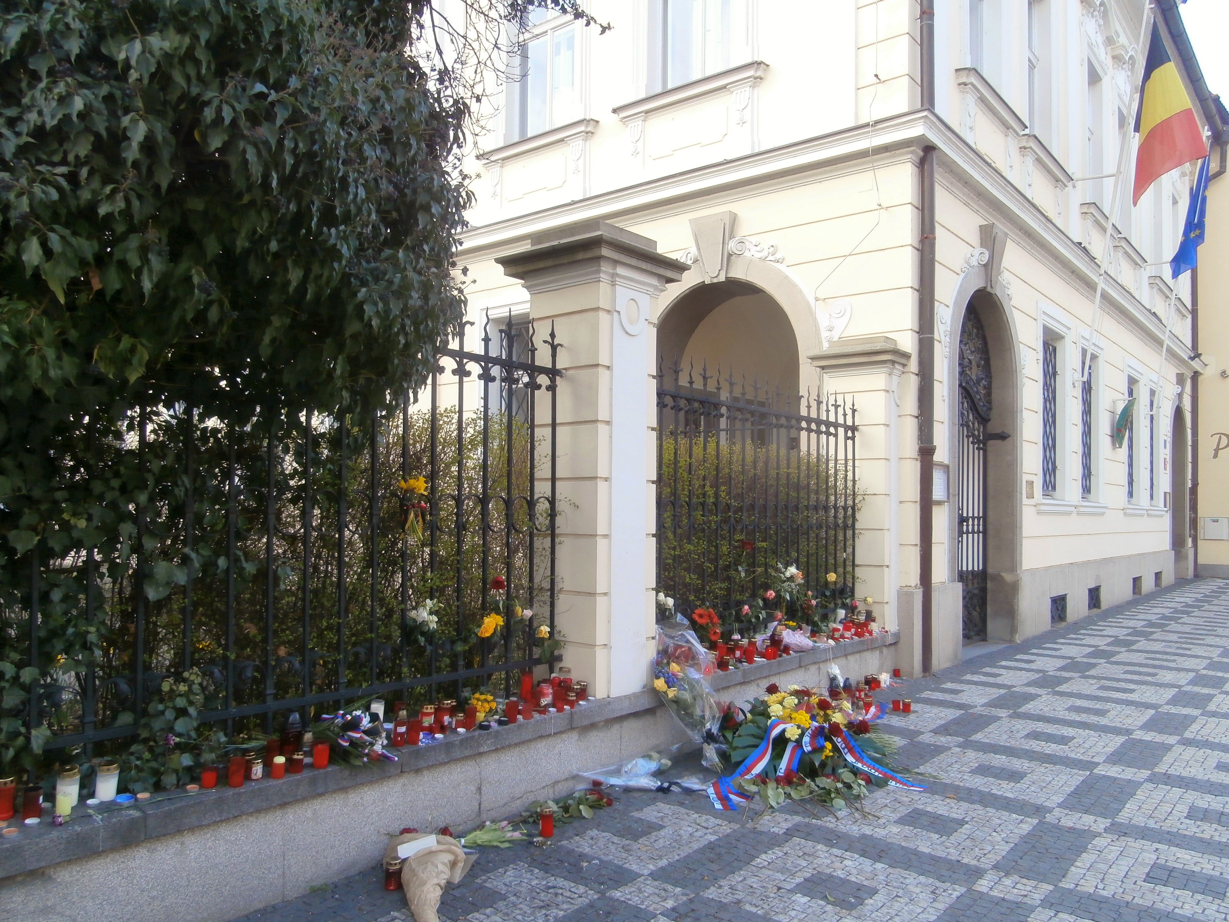 Pietní místo před velvyslanectvím Belgického království na Malé Straně po teroristických útocích v Bruselu v březnu 2016